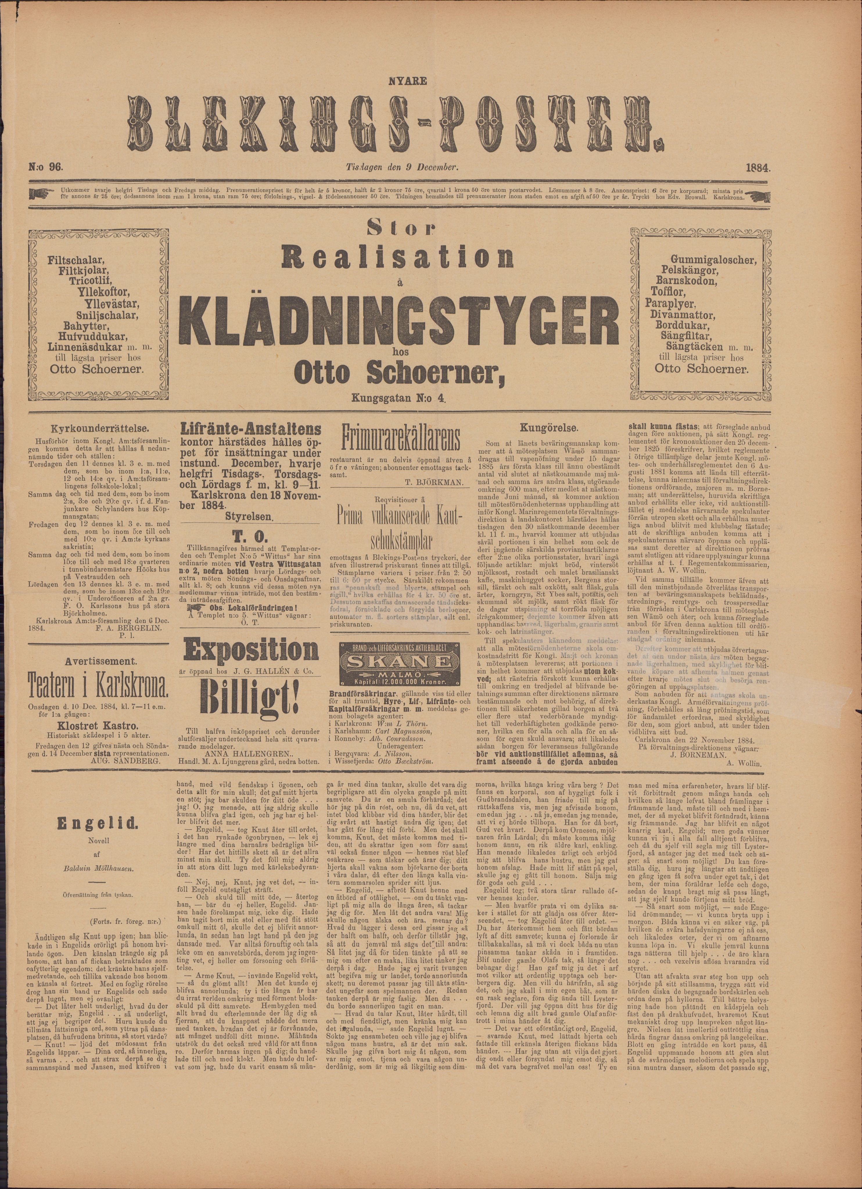 Sista numret av Nyare Blekings-Posten den 9 december 1884.